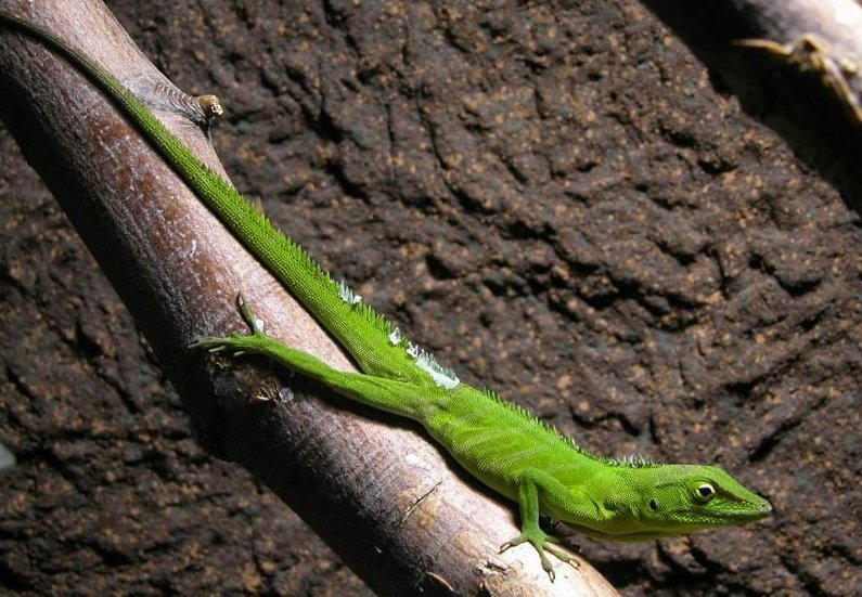 Selbst fotografiert. Aufgenommen mit einer Nikon Coolpix 5700 im Landauer Reptilium. Fotograf/Quelle: Wilfried Berns / Motiv: Jamaika Anolis (Anolis garmani)